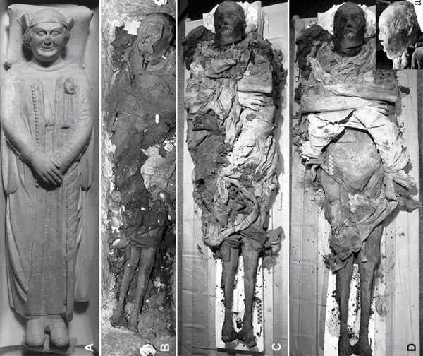 Fotografia della parte superiore del sarcofago e della mummia di Cangrande della Scala